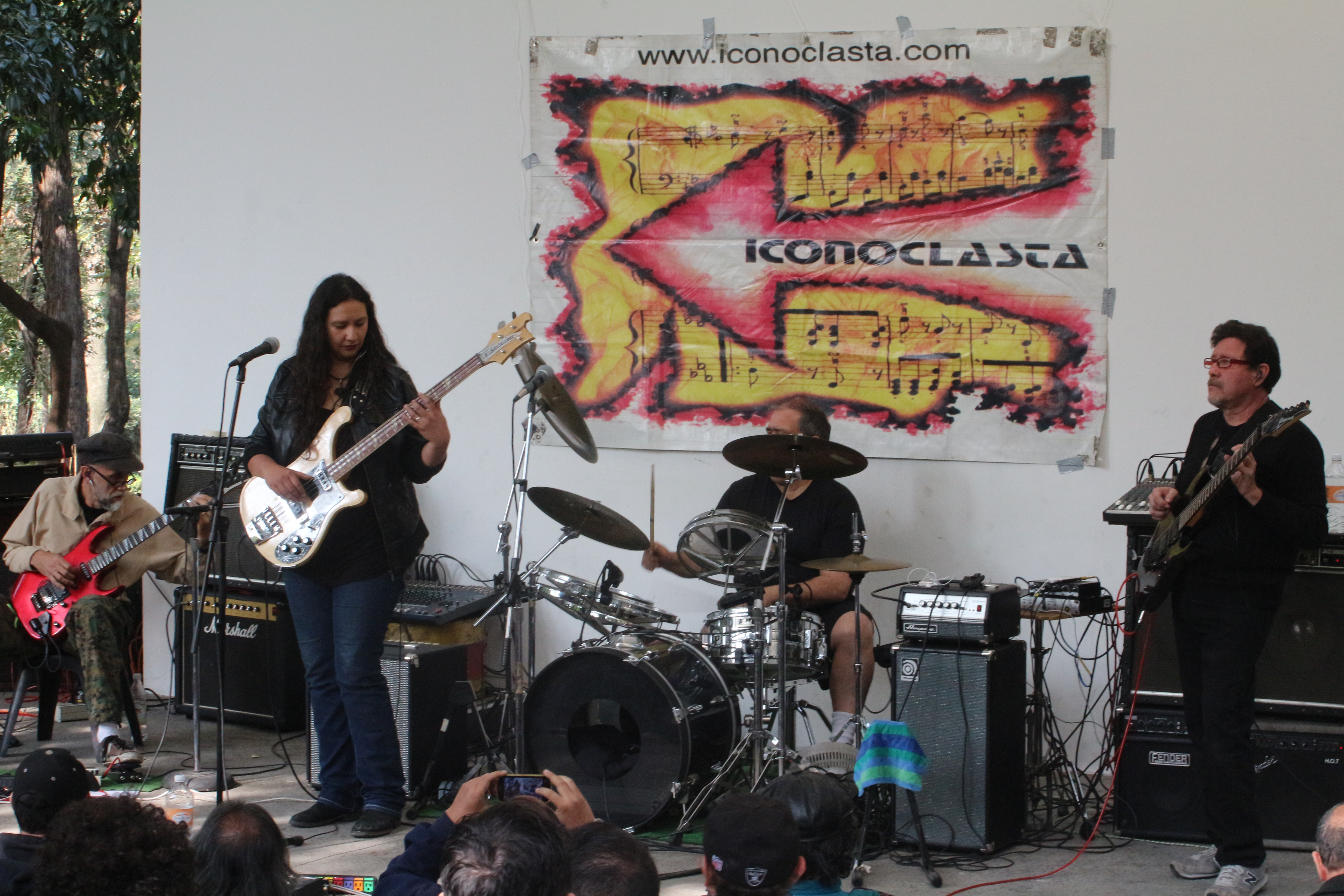 La banda mexicana de rock progresivo Iconoclasta en su concierto de 35 aniversario. 5 de noviembre de 2015, Audiorama del Parque Hundido, ciudad de México.